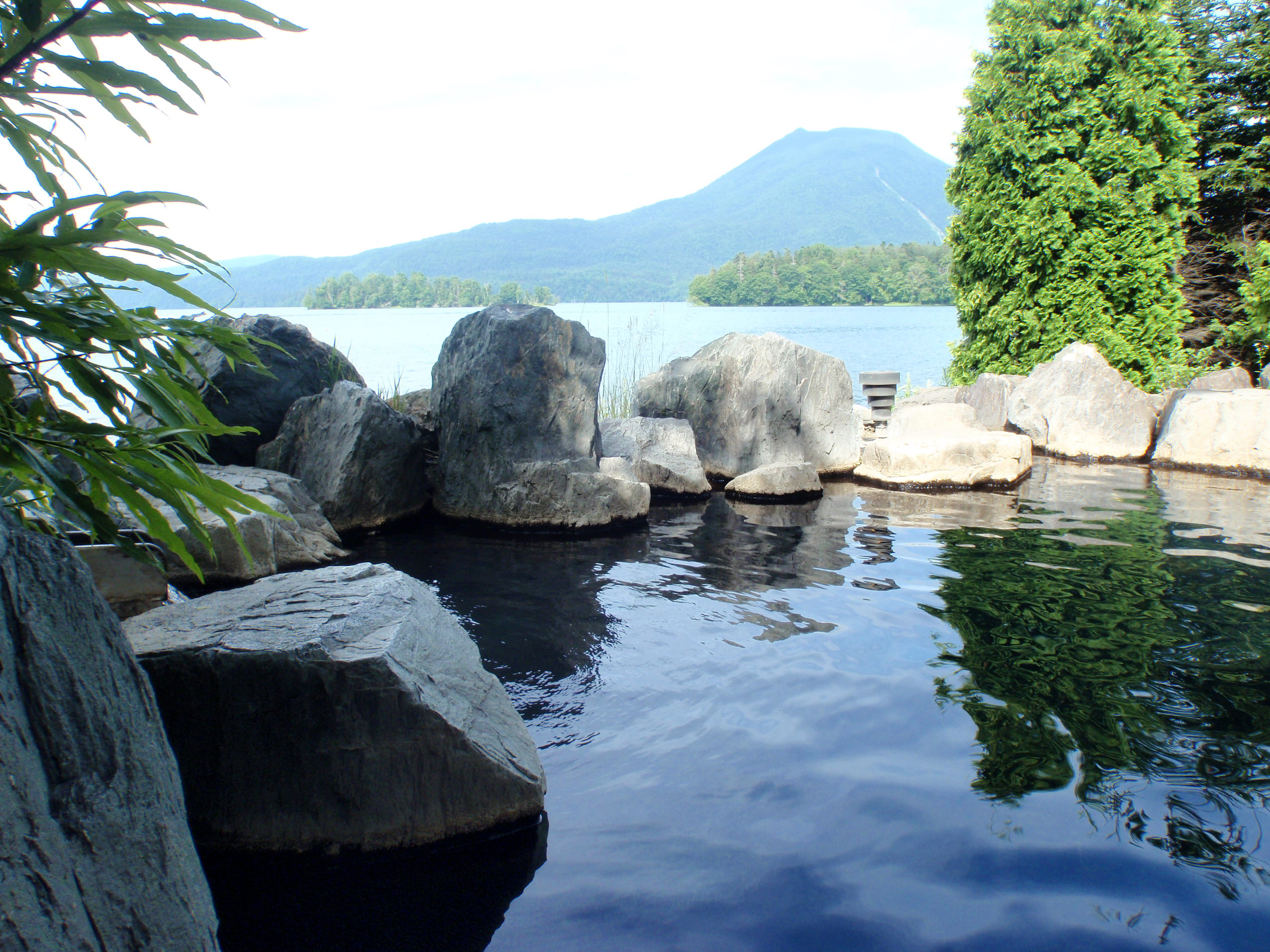 阿寒湖越しに雄阿寒岳を望む、阿寒湖温泉、「あかん遊久の里 鶴雅」の露天風呂